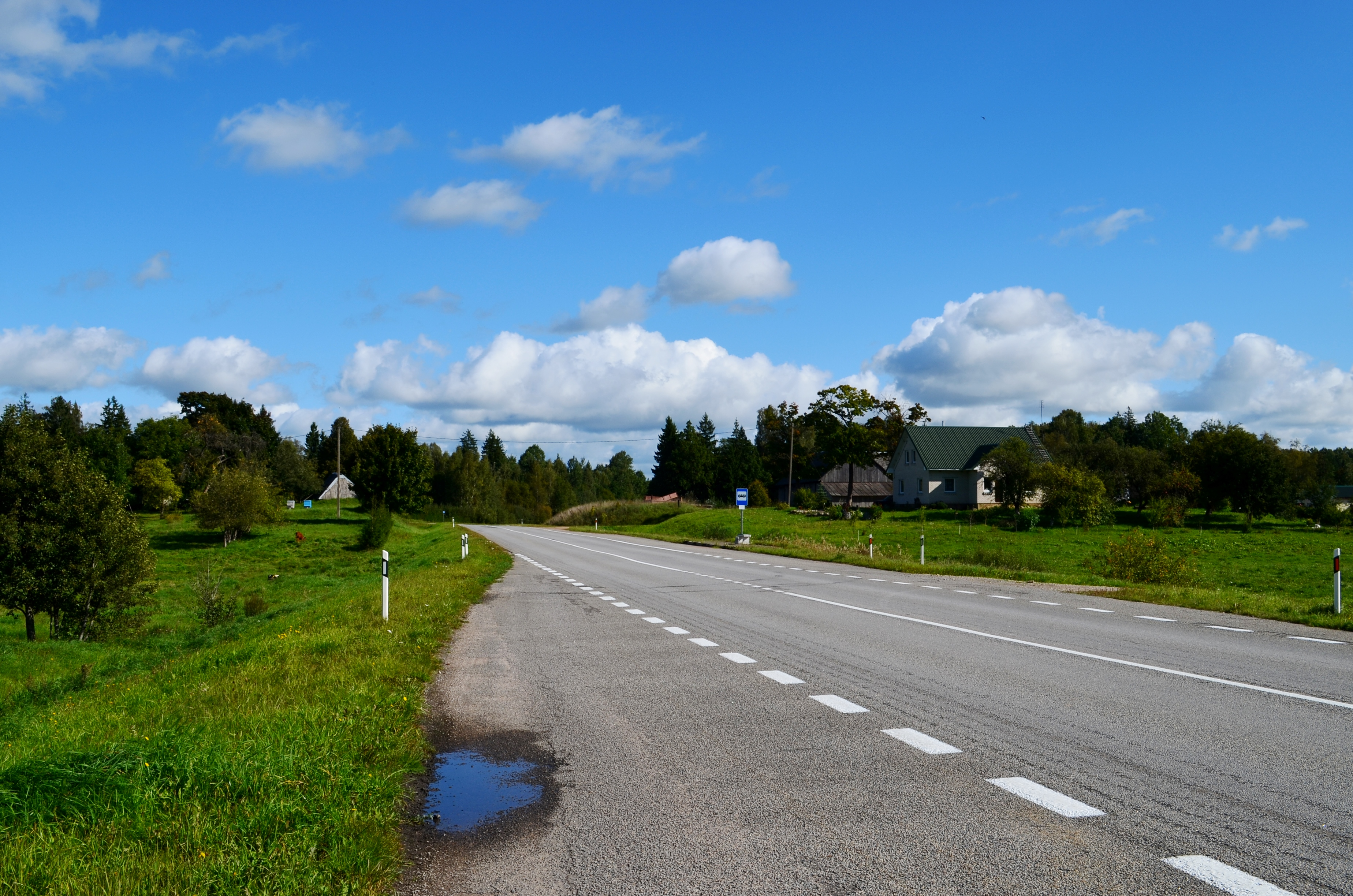 Žemaitėška: Dargėškė, Šėlotės rajuons